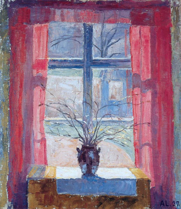 Bøgeløv i vindue, Båxhult